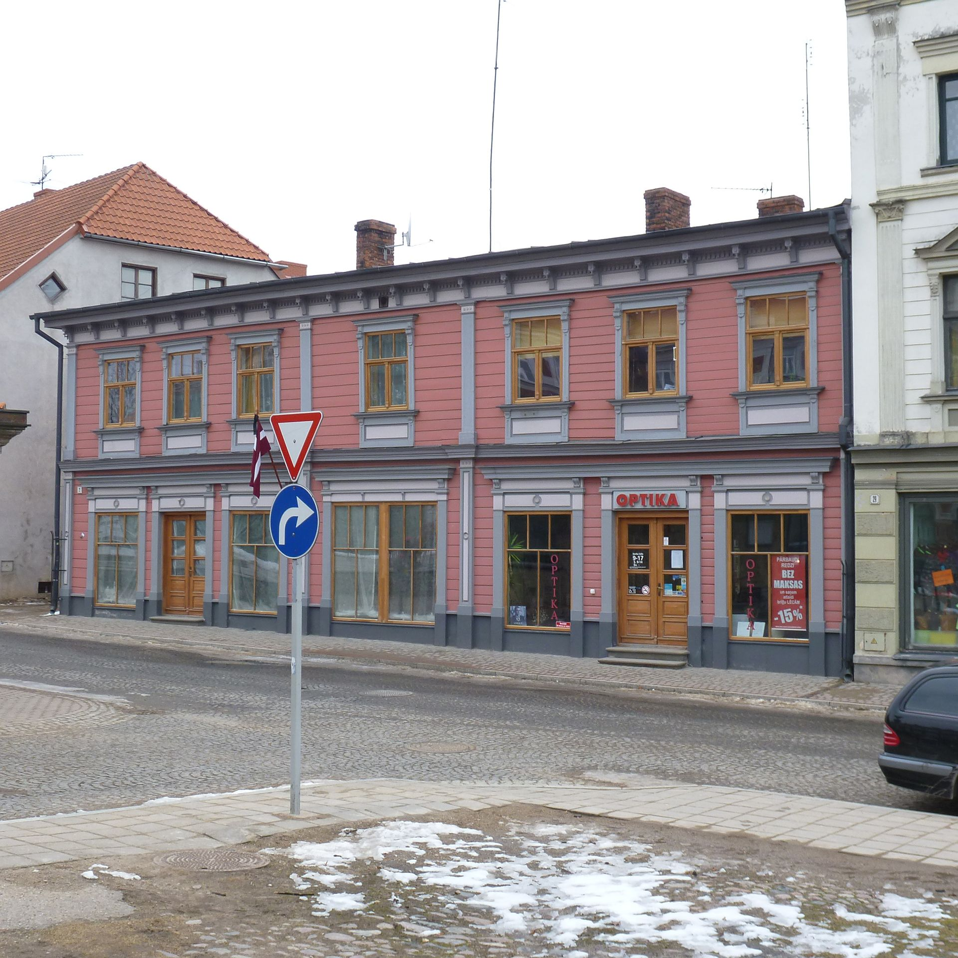 Talo Cēsisin keskustassa.